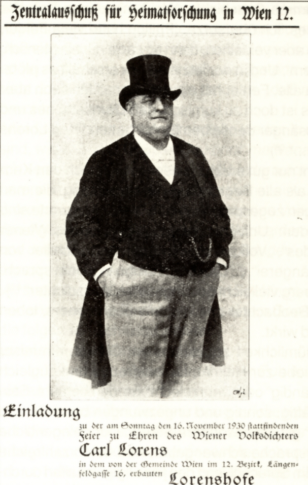 Einladung zur Carl Lorens Gedenkfeier im Lorenshof am 16. November 1930